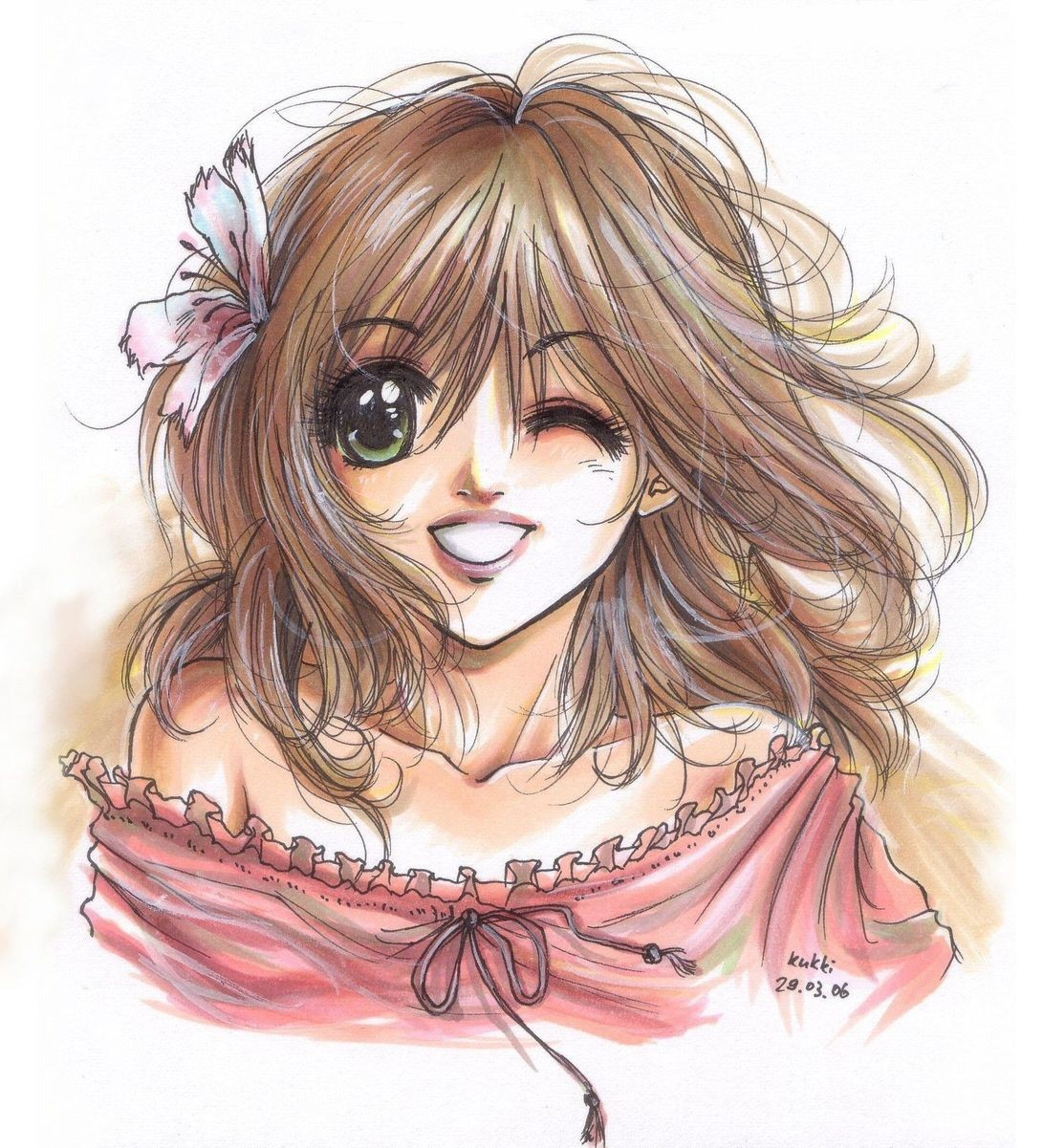 2. Platz des Wikipedia-Wettbewerbs bei Animexx in der Kategorie Genre als Illustration für Bishoujo.